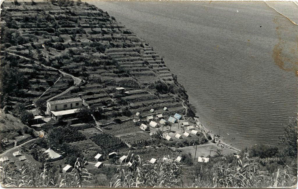 Razglednica Pacuga.